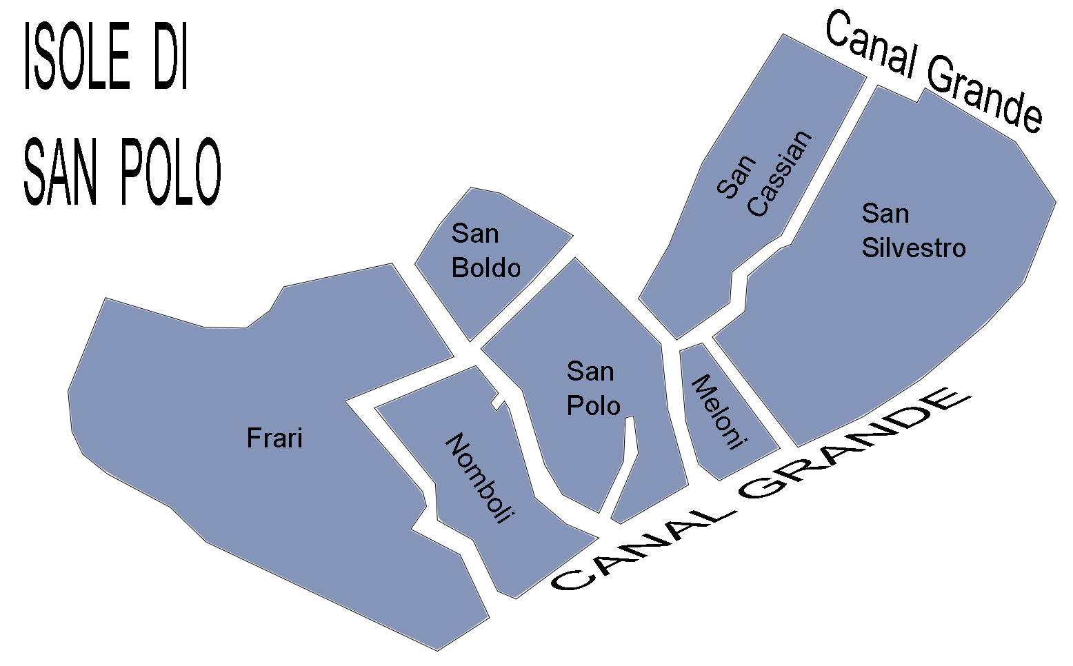 iles de san polo venise